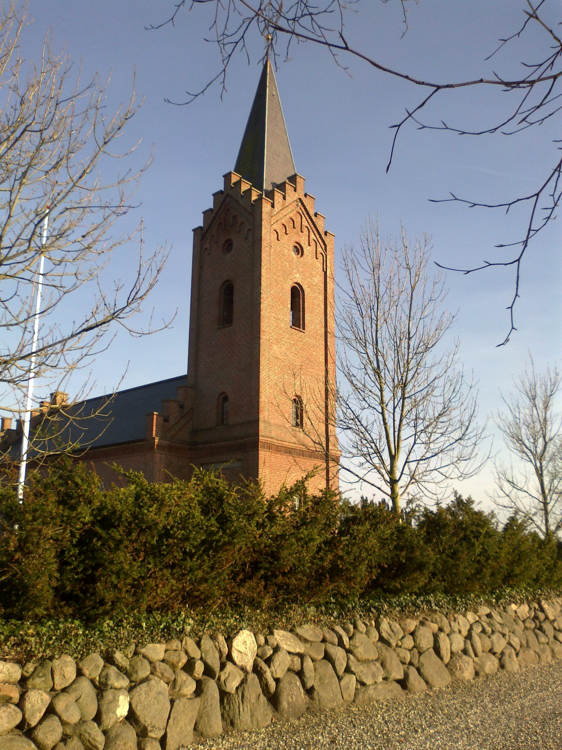 Over Hadsten Kirke set fra nordvest.